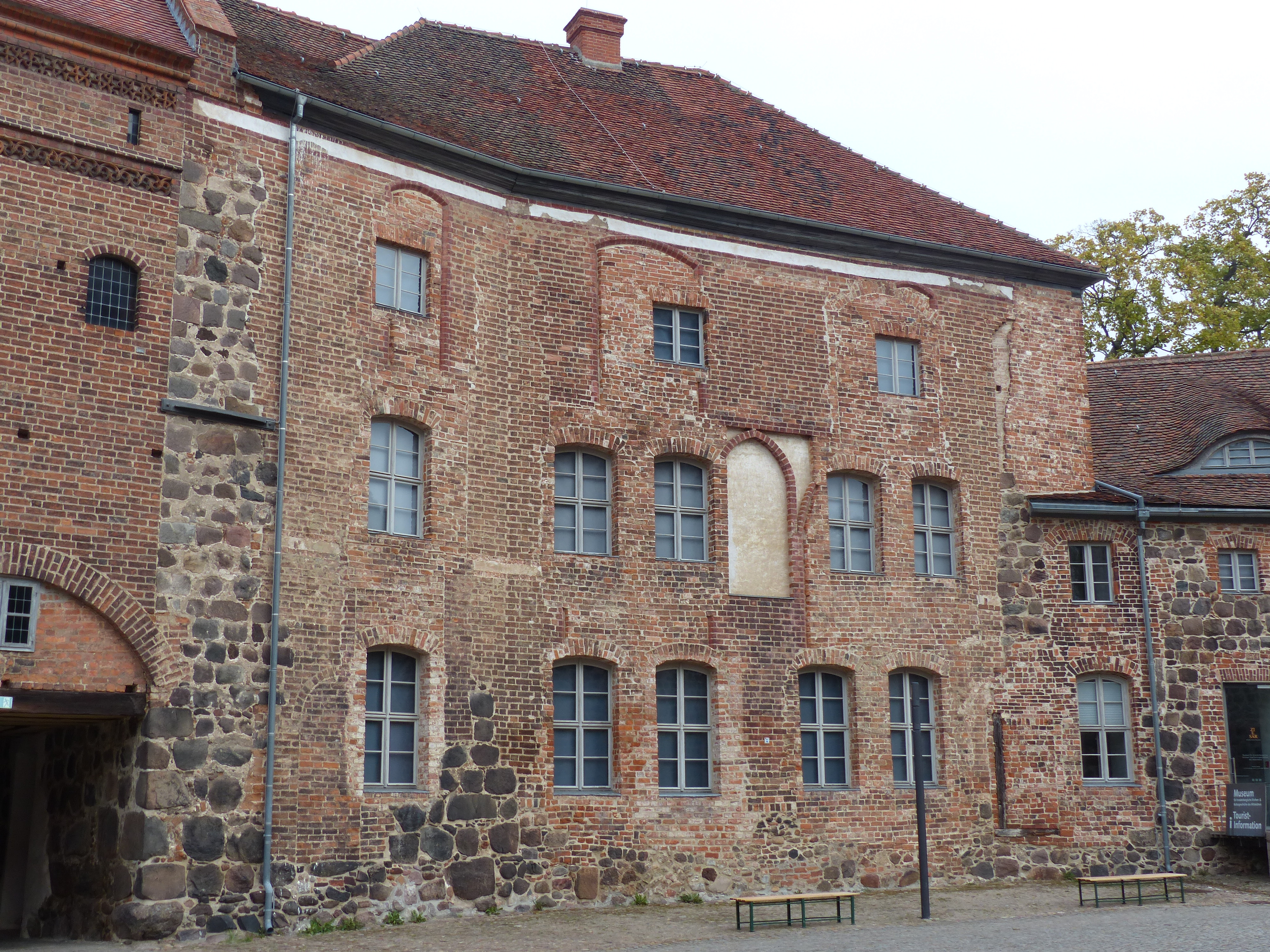 Burg Ziesar: Palas vom Hof gesehen